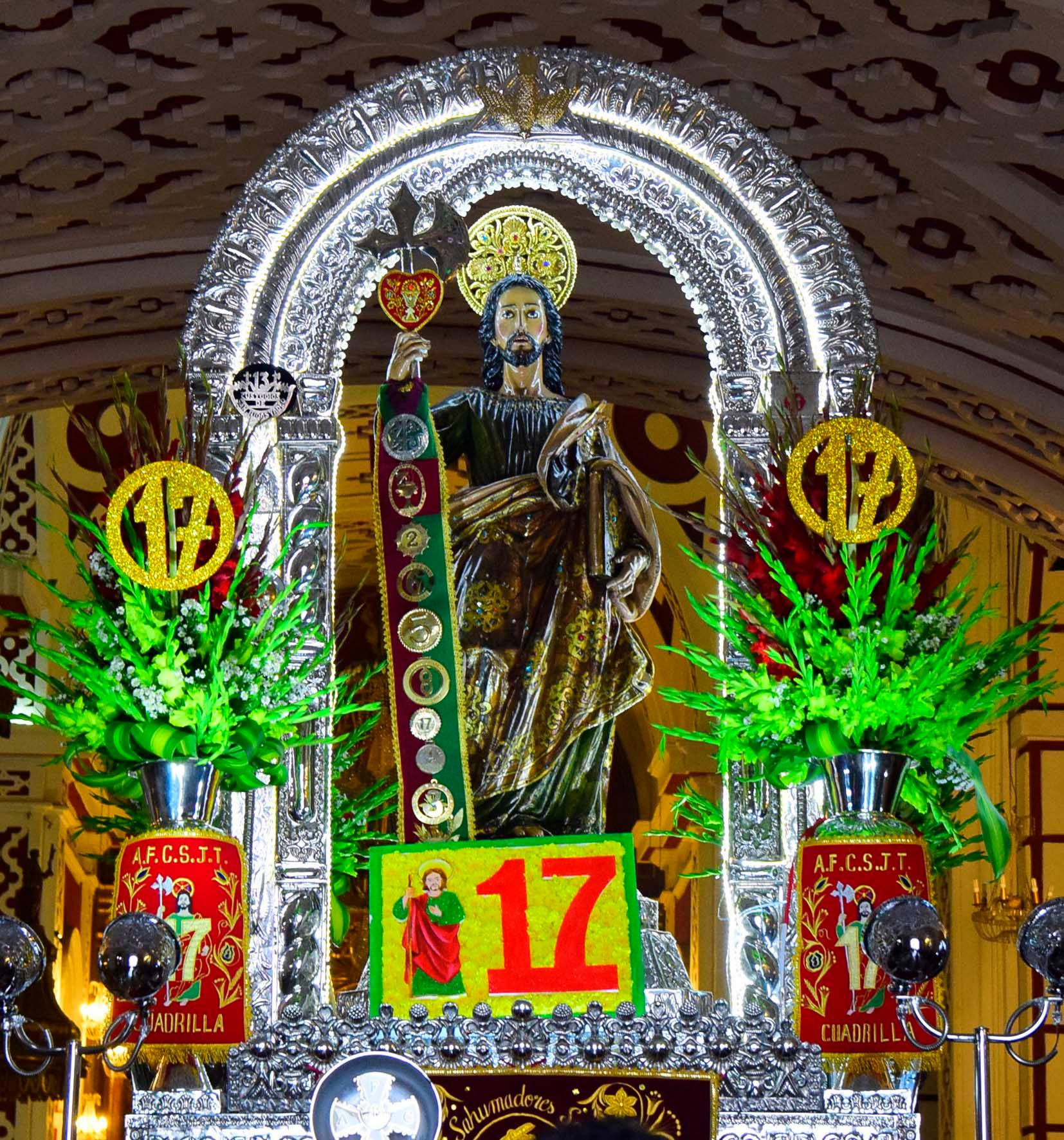 En su procesión 2018